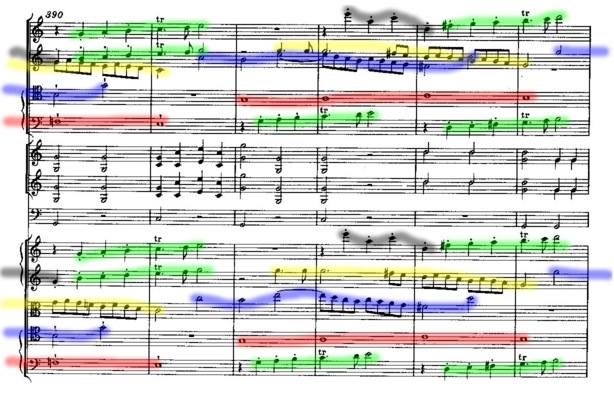 Finale de la Symphonie n° 41 Jupiter KV 551Wolfgang Amadeus Mozart.